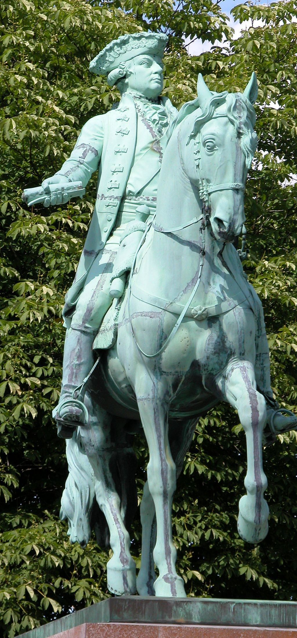 Braunschweig: Reiterstandbild von Karl Wilhelm Ferdinand von Braunschweig, von Franz Pönninger